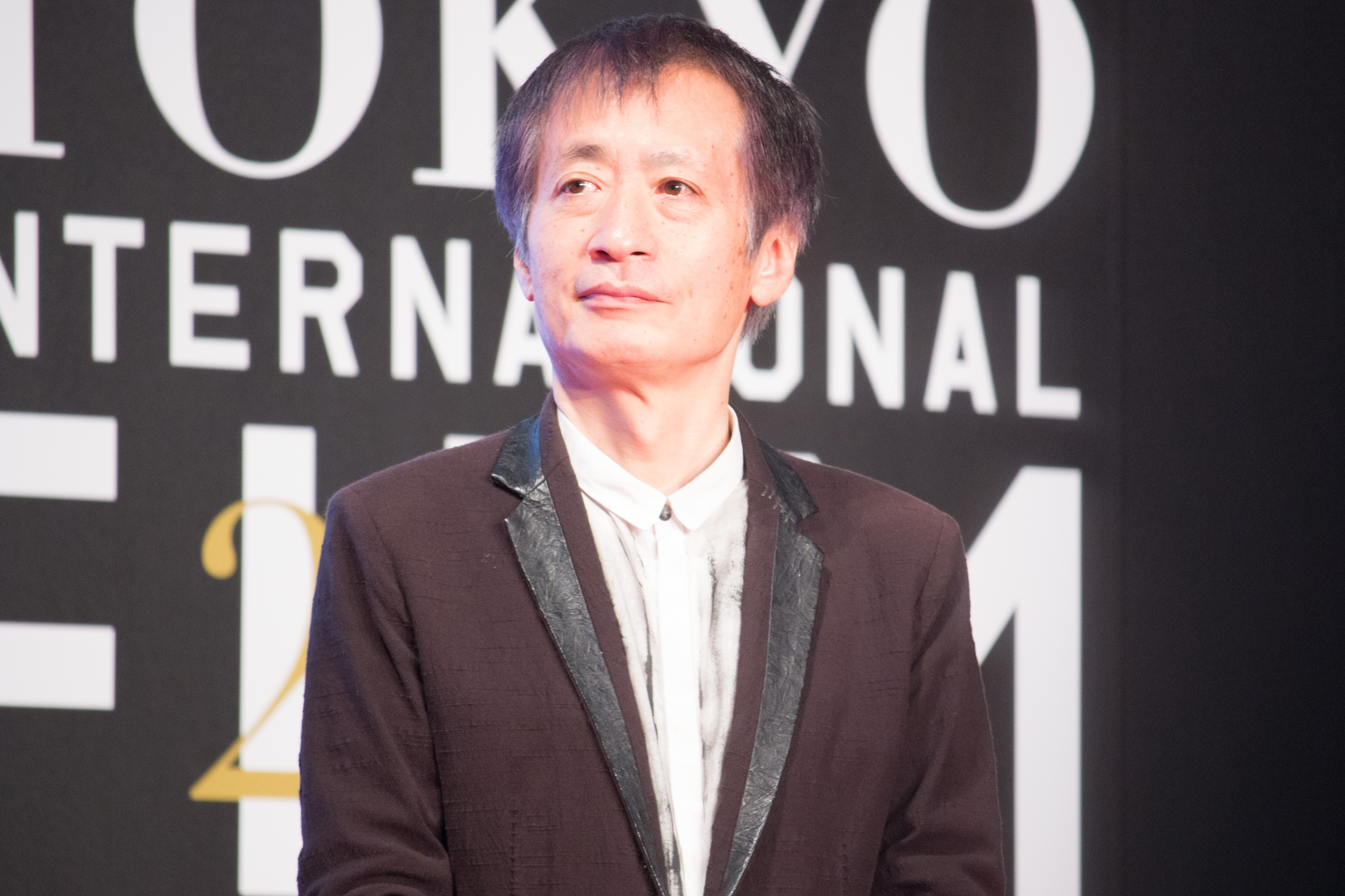 第28回 東京国際映画祭 オープニングセレモニー 奥山和由 (さようなら)